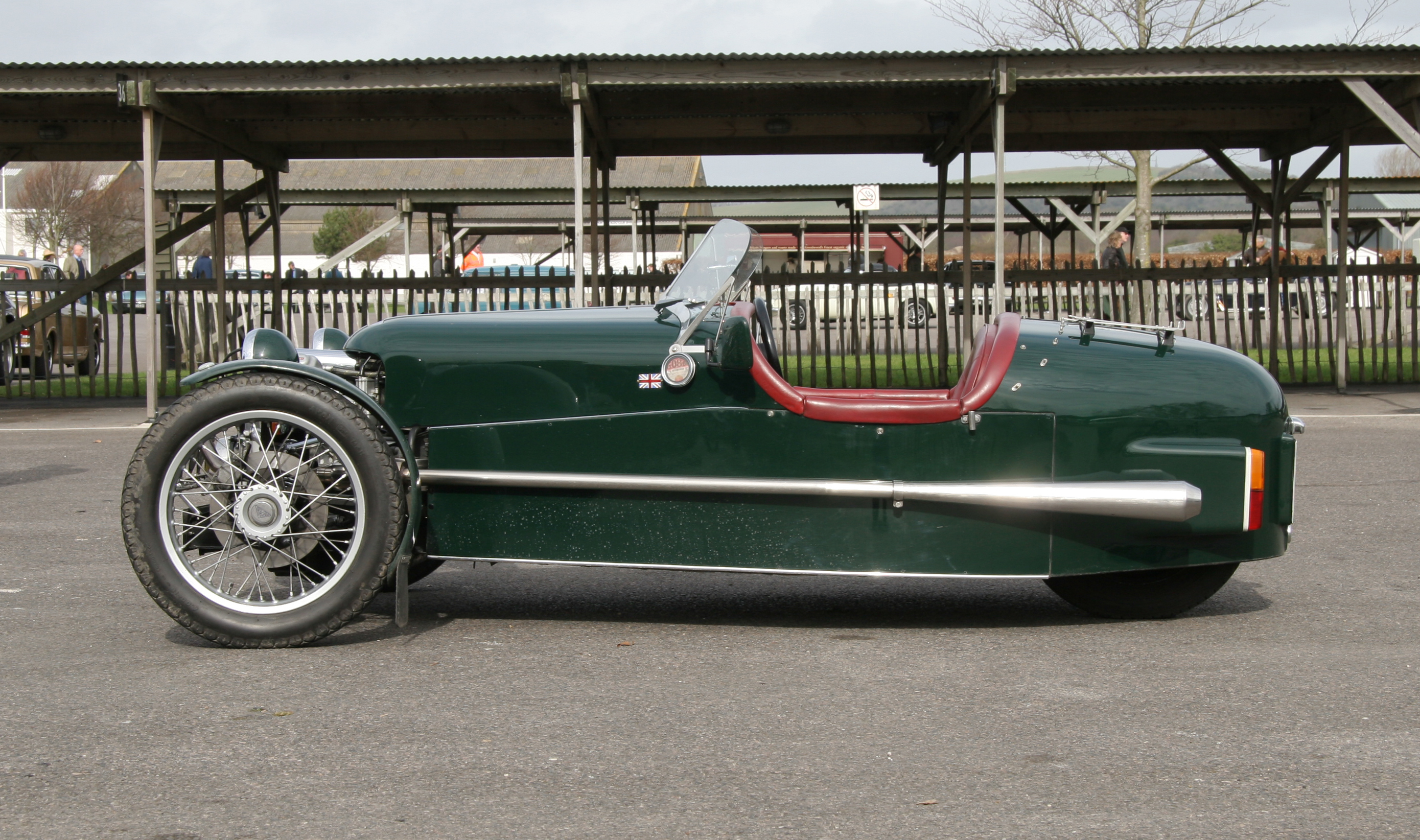 Triking Cyclecar